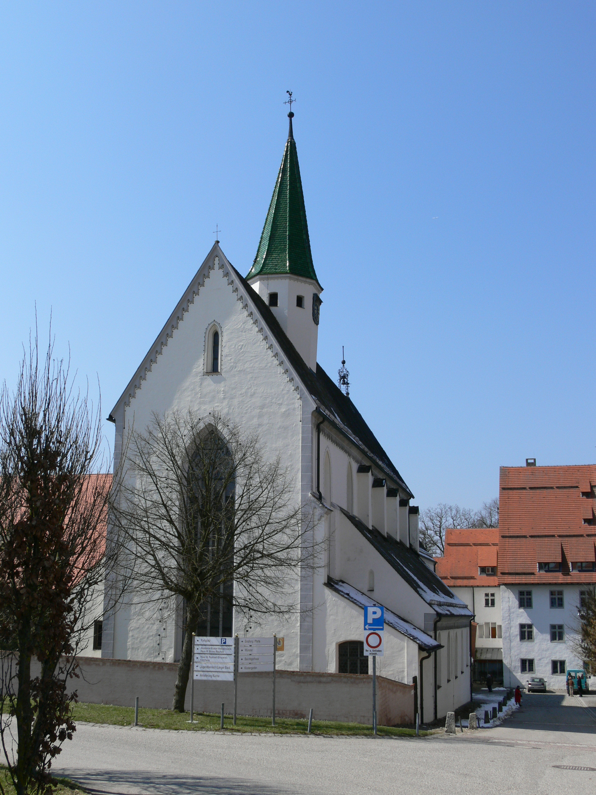 Kloster Heiligkreuztal Münster (Klosterkirche)